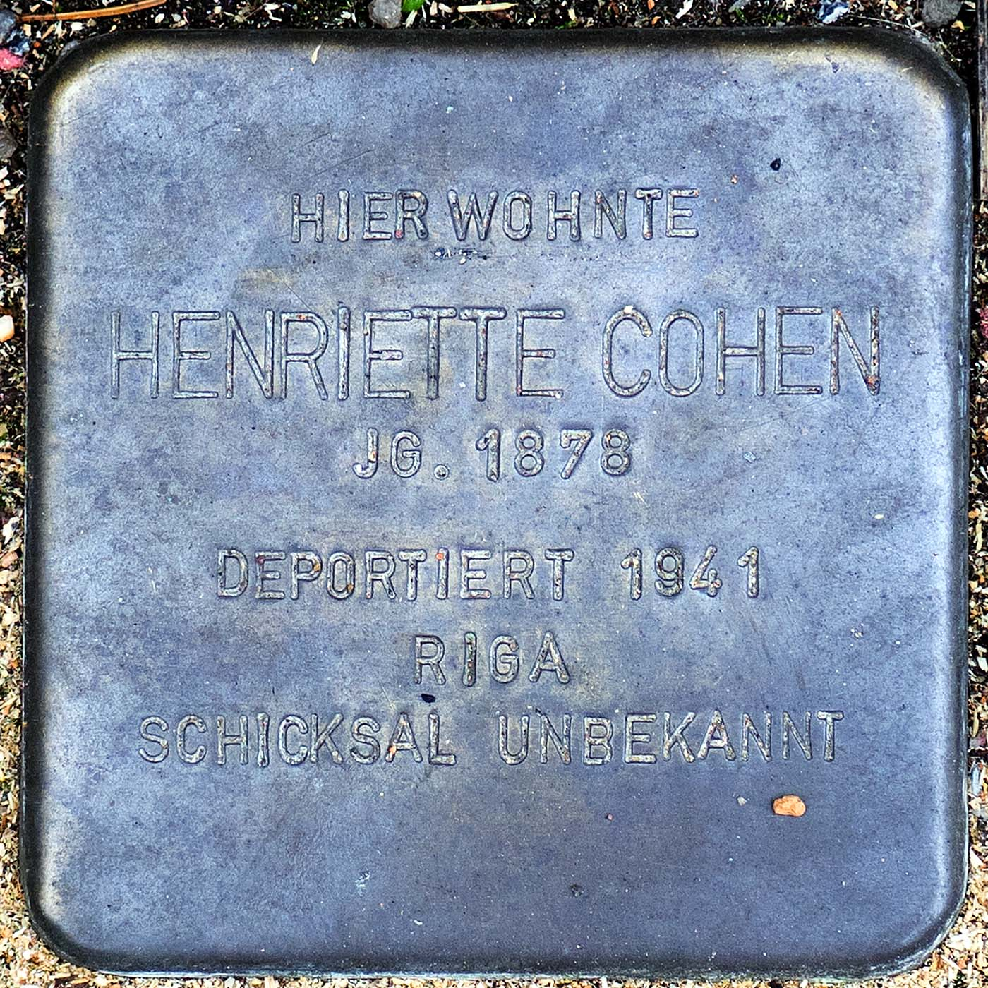 Stolperstein für Henriette Cohen (Willich)